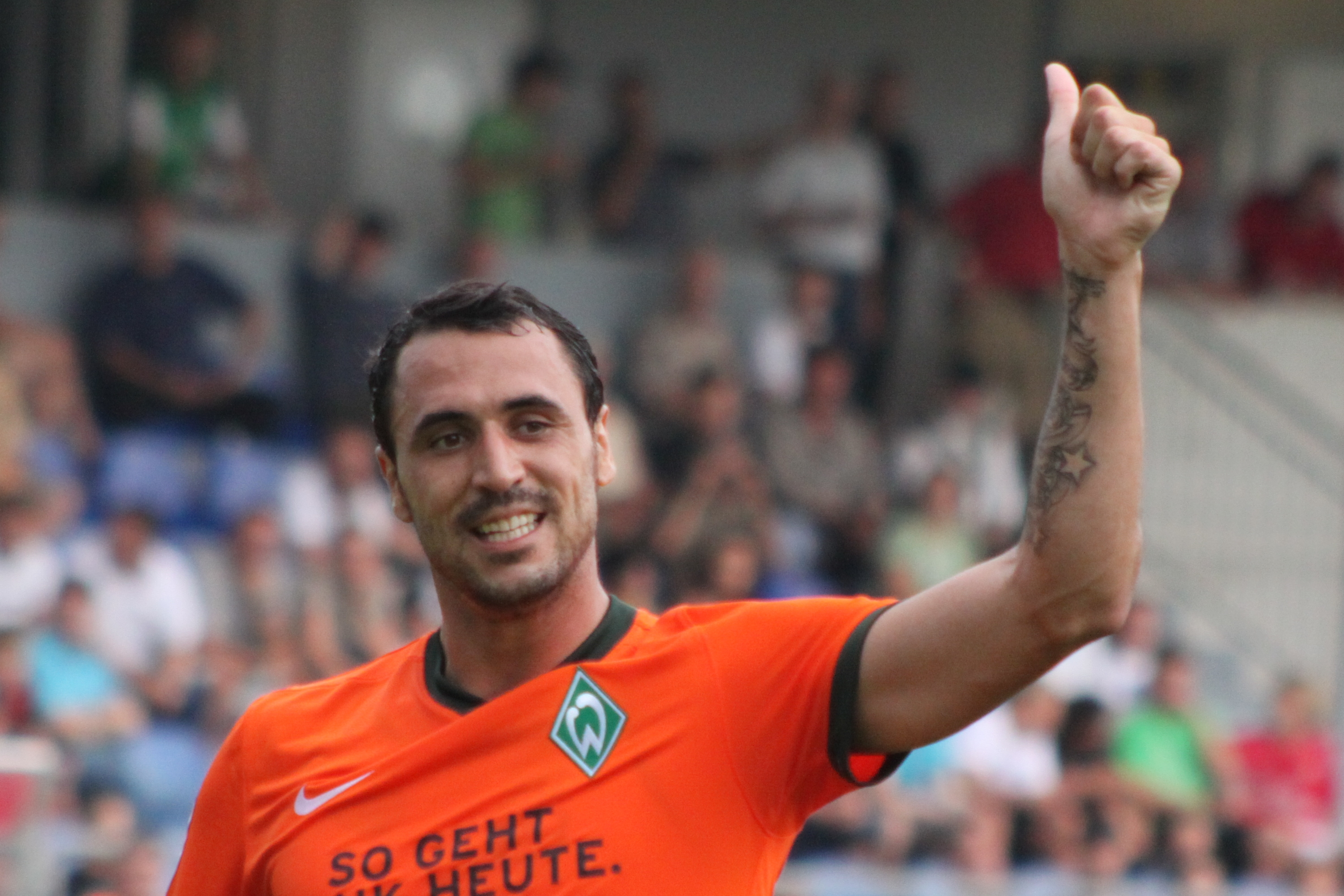 Hugo Almeida - SV Werder Bremen (3)